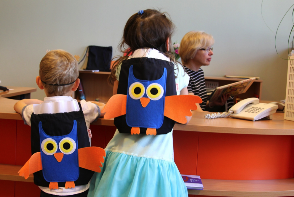 "Grāmatu starts" Latvijas bibliotēkās